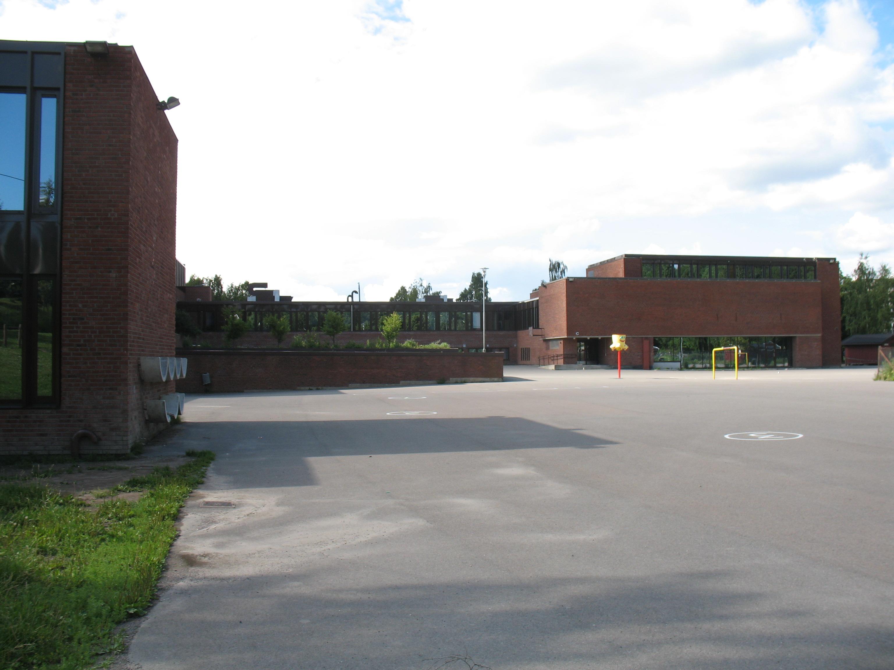 Rustad skole i Bydel Østensjø i Oslo.